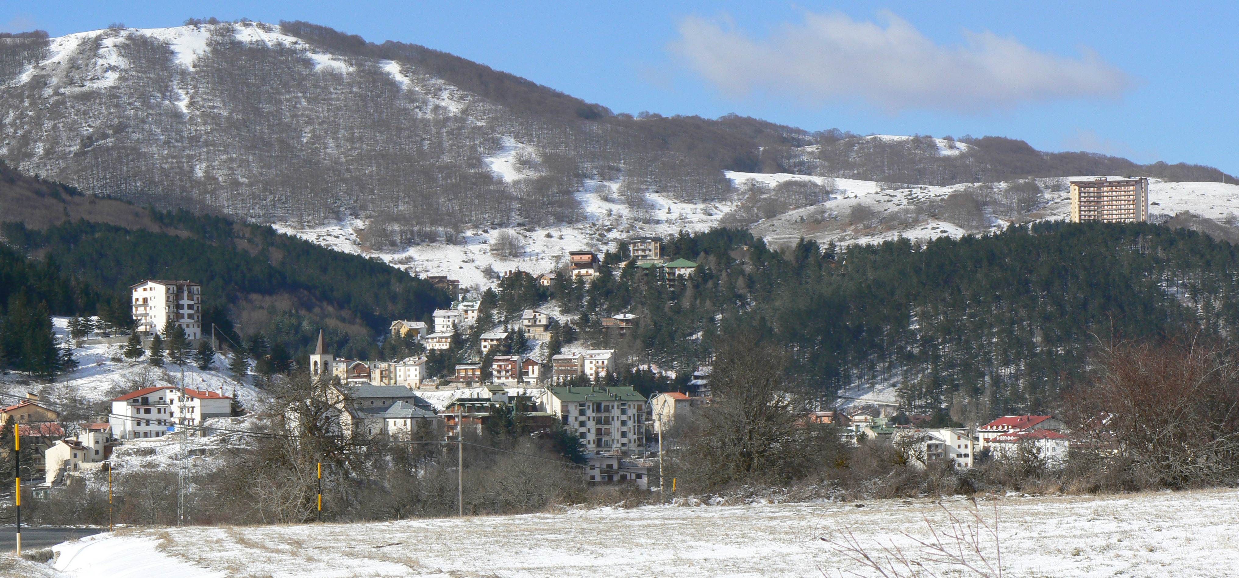 67037 Roccaraso AQ, Italy